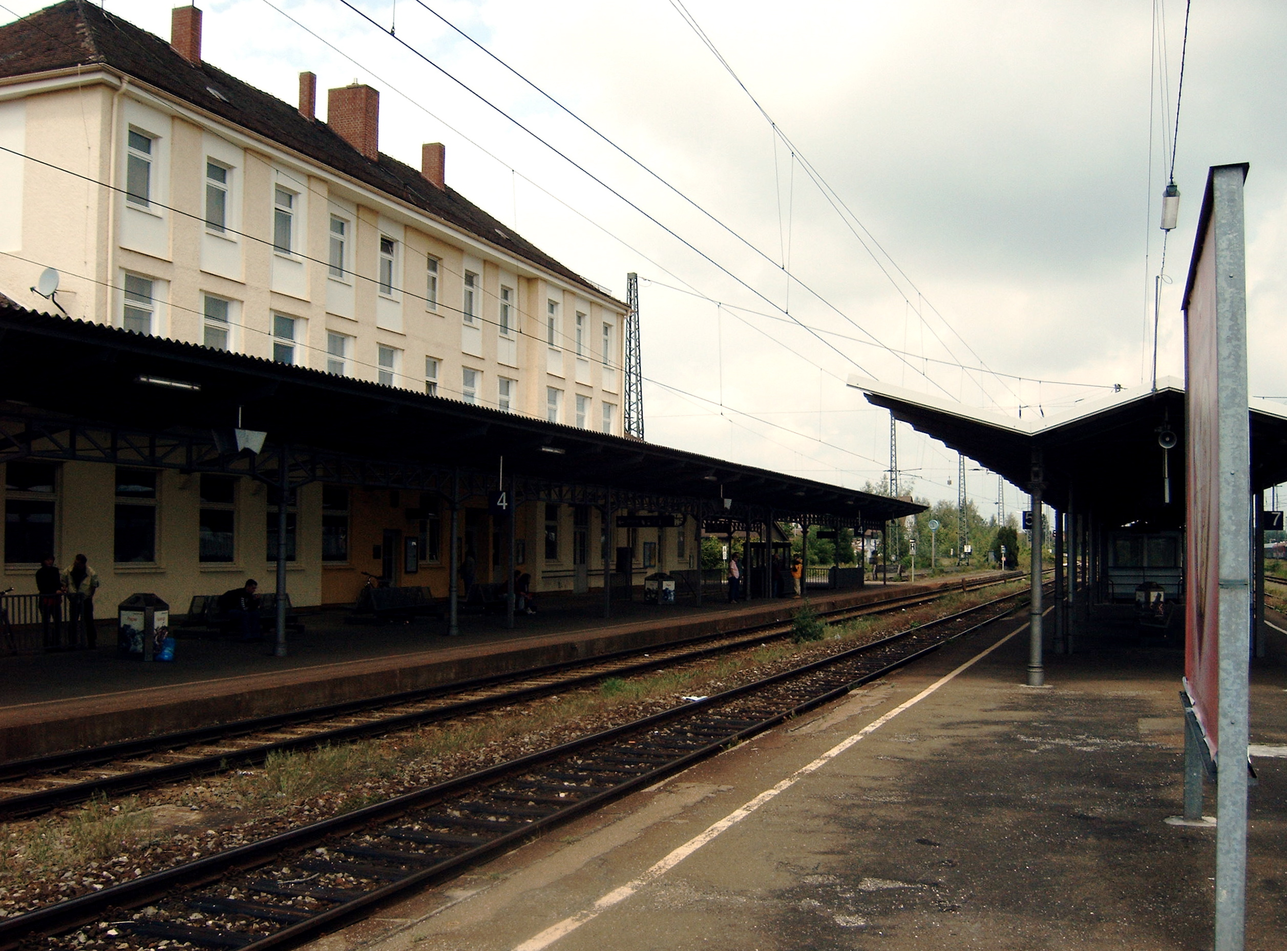 Bahnhof Nördlingen der Riesbahn und Ausgangspunkt anderer Strecken, 2006